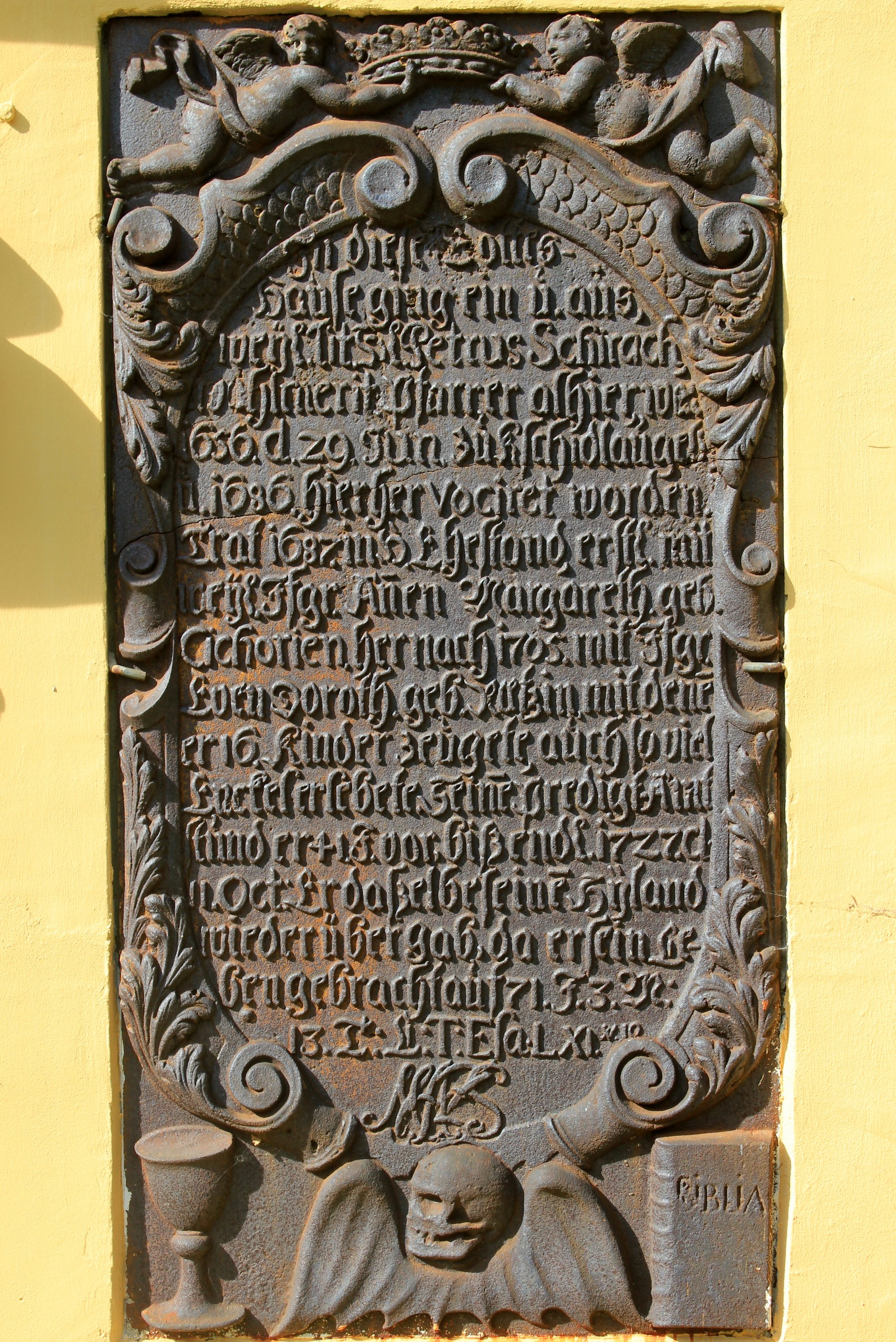 Hornjoserbsce: Narowna plata Pětra Šěracha (1656–1727) při Chrjebjanskej cyrkwi.